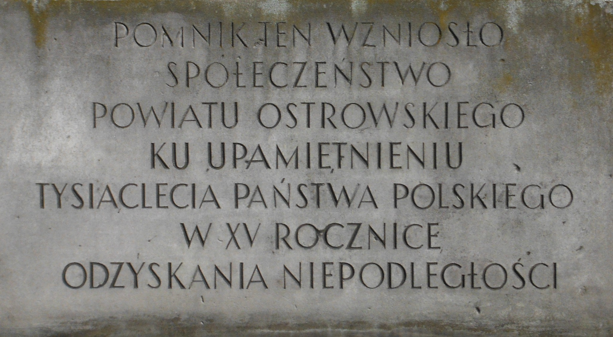 Pomnik Żołnierza i Partyzanta w Ostrowi Mazowieckiej (tzw. "Ostrowska Nike") autorstwa Karola Tchorka